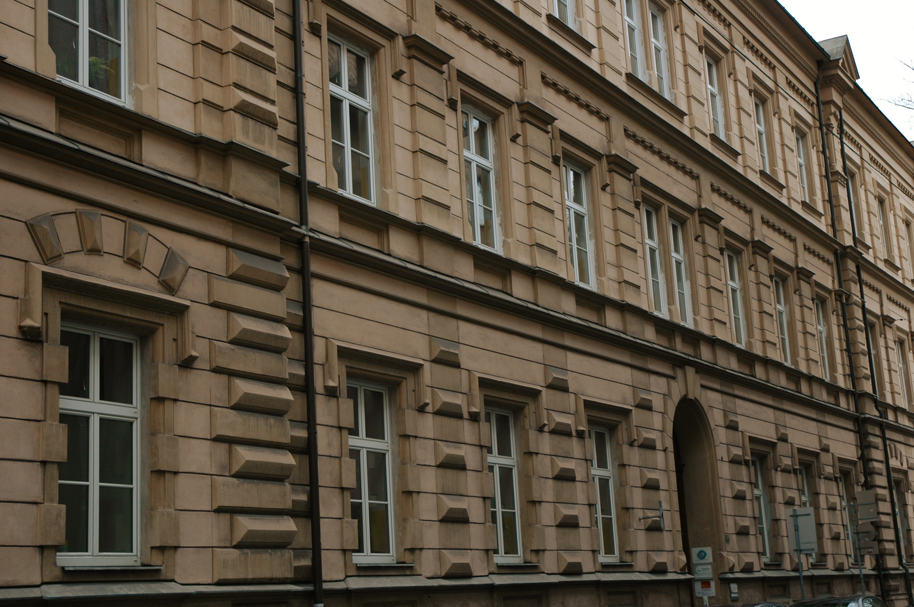 historistische Gebäudefassade in Linz, Steingasse